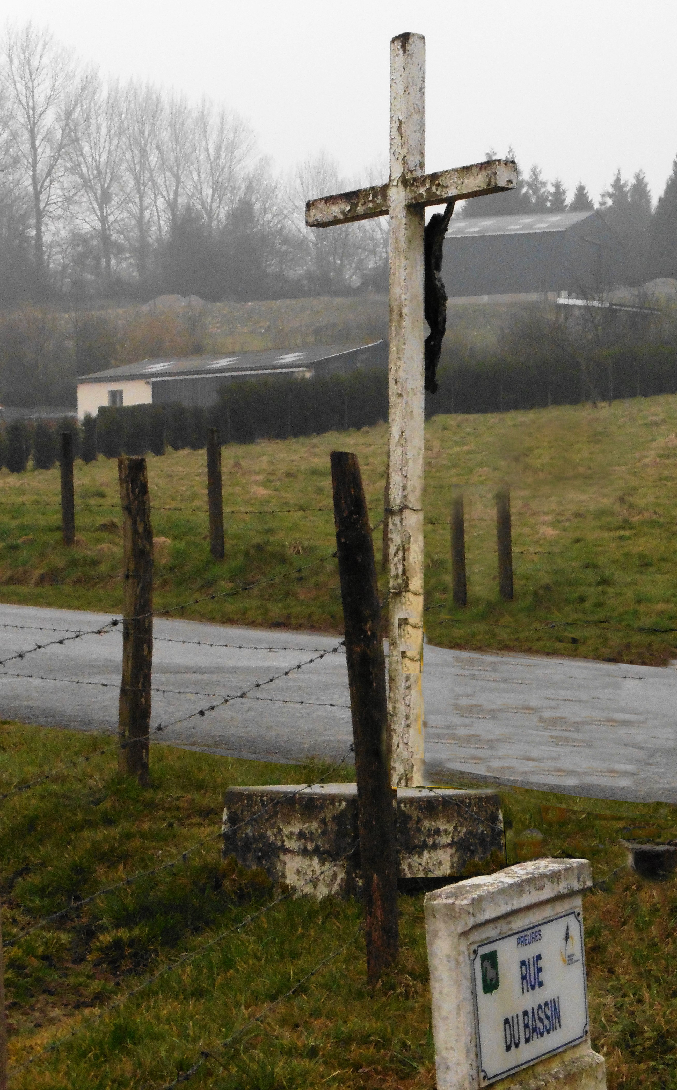 Calvaire, à Preures.- Pas-de-Calais.- ( Pas-Calés).- France.